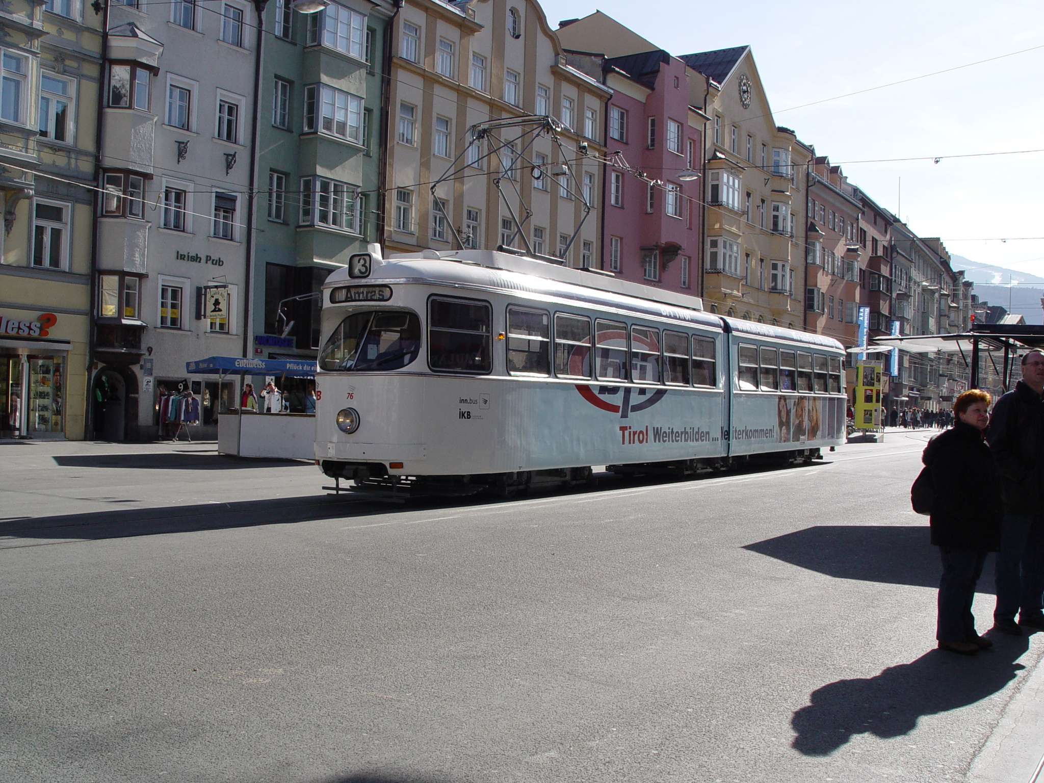 Triebwagen 76 der Innsbrucker Verkehrsbetriebe in der Maria-Theresien-Straße